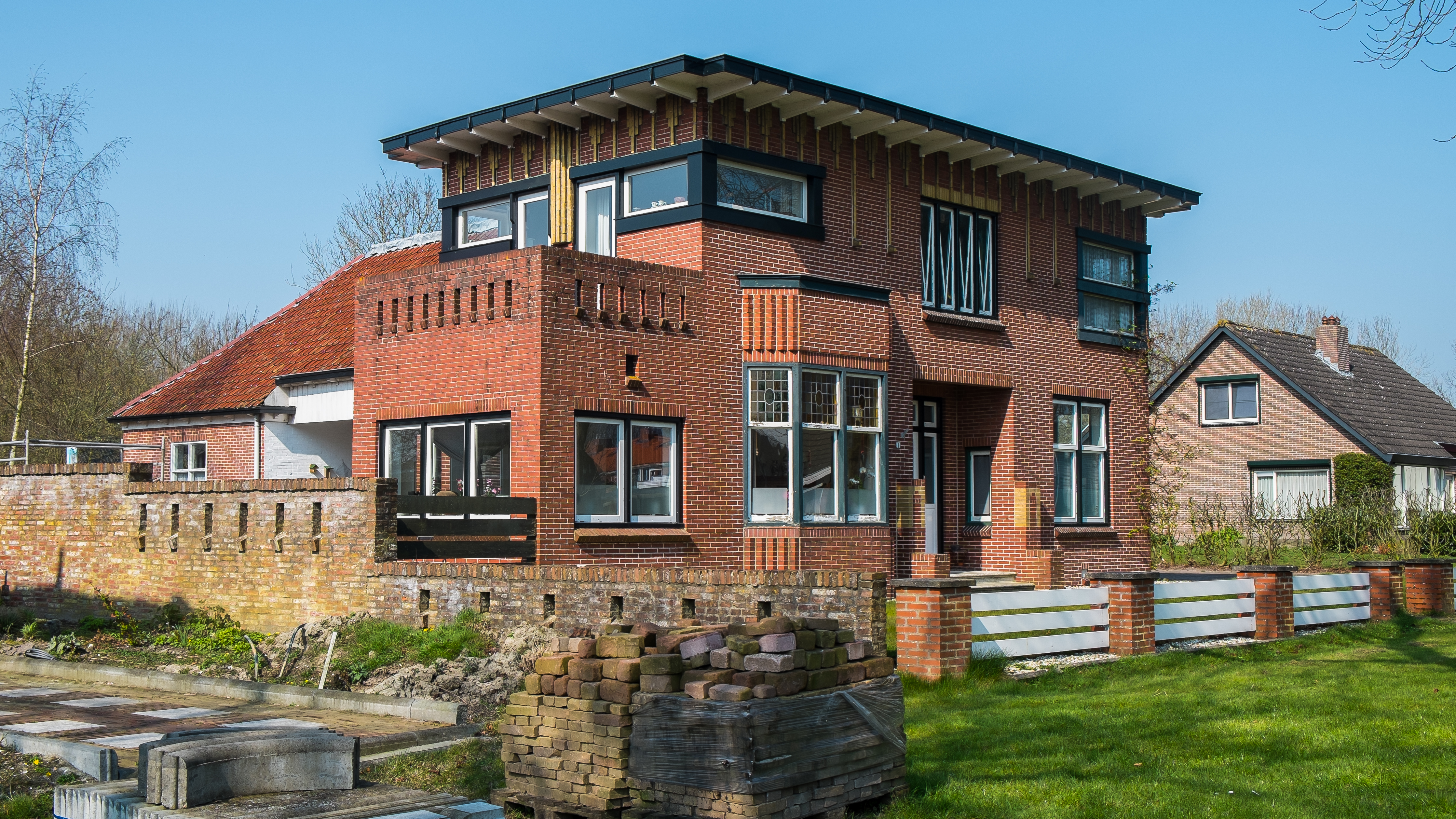 Woonhuis met aangebouwde schuur aan de Stationsweg 1 in Ulrum